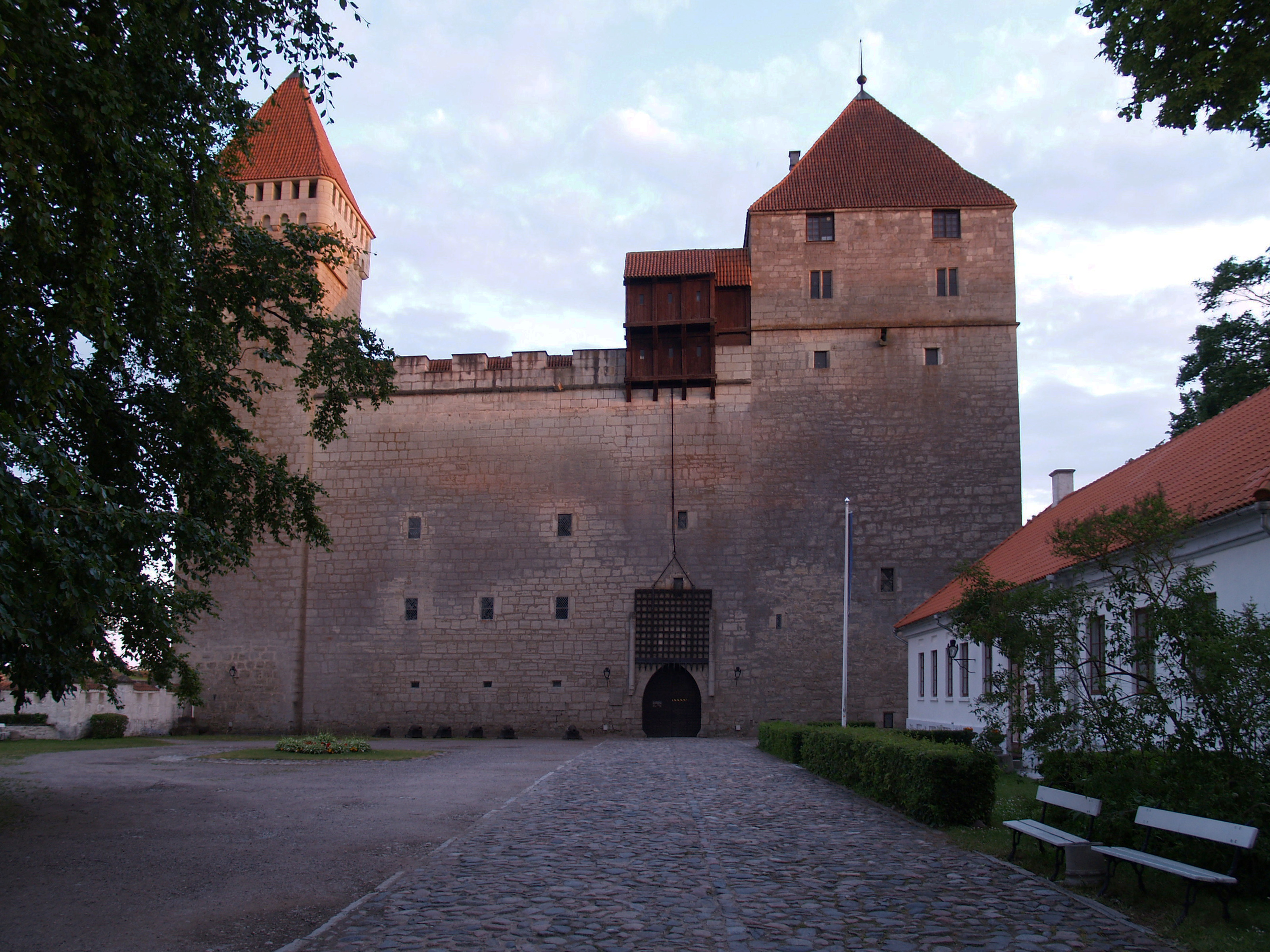 Kuressaare linnus eestvaates